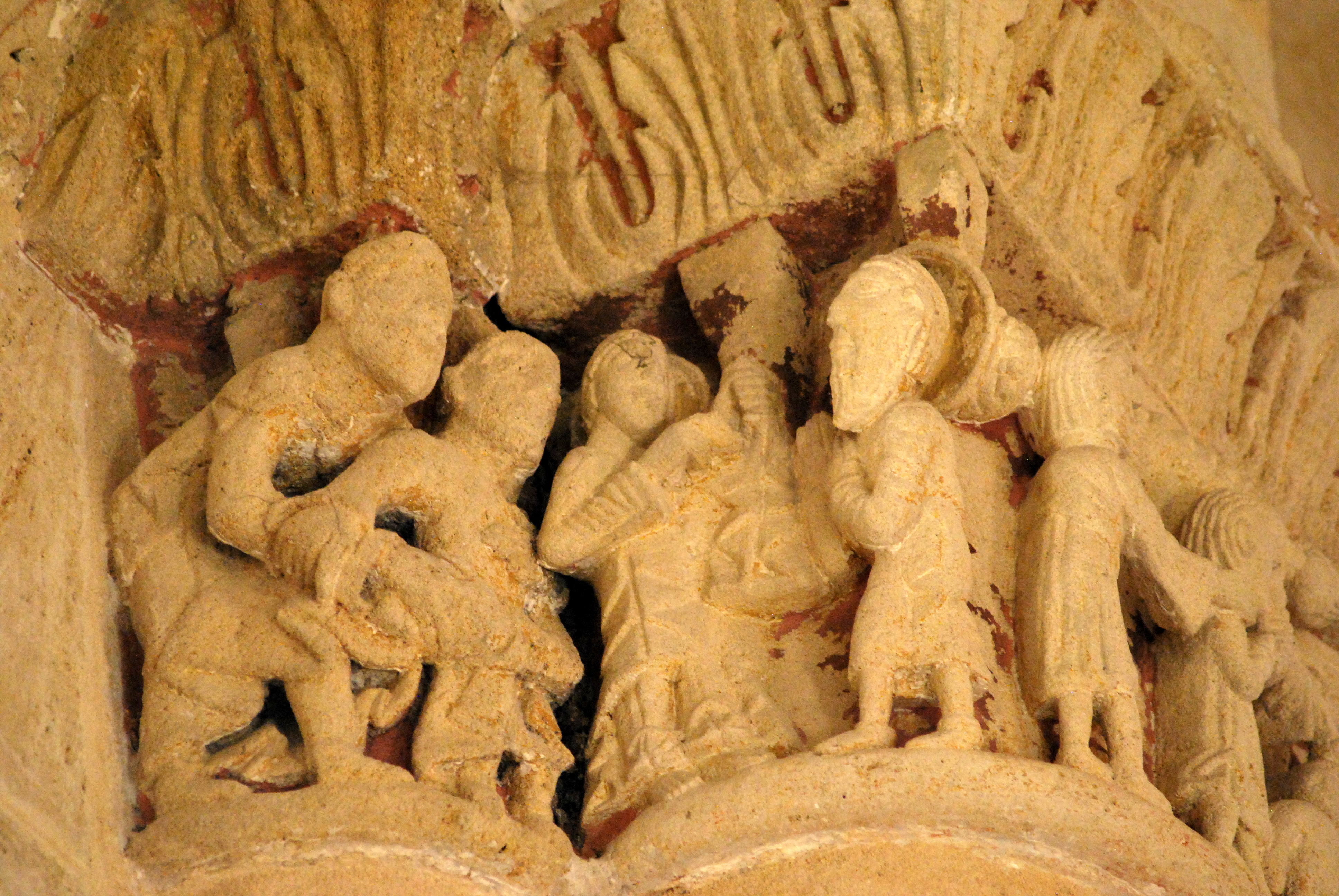 Église Saint-Quentin de Baron, Gironde